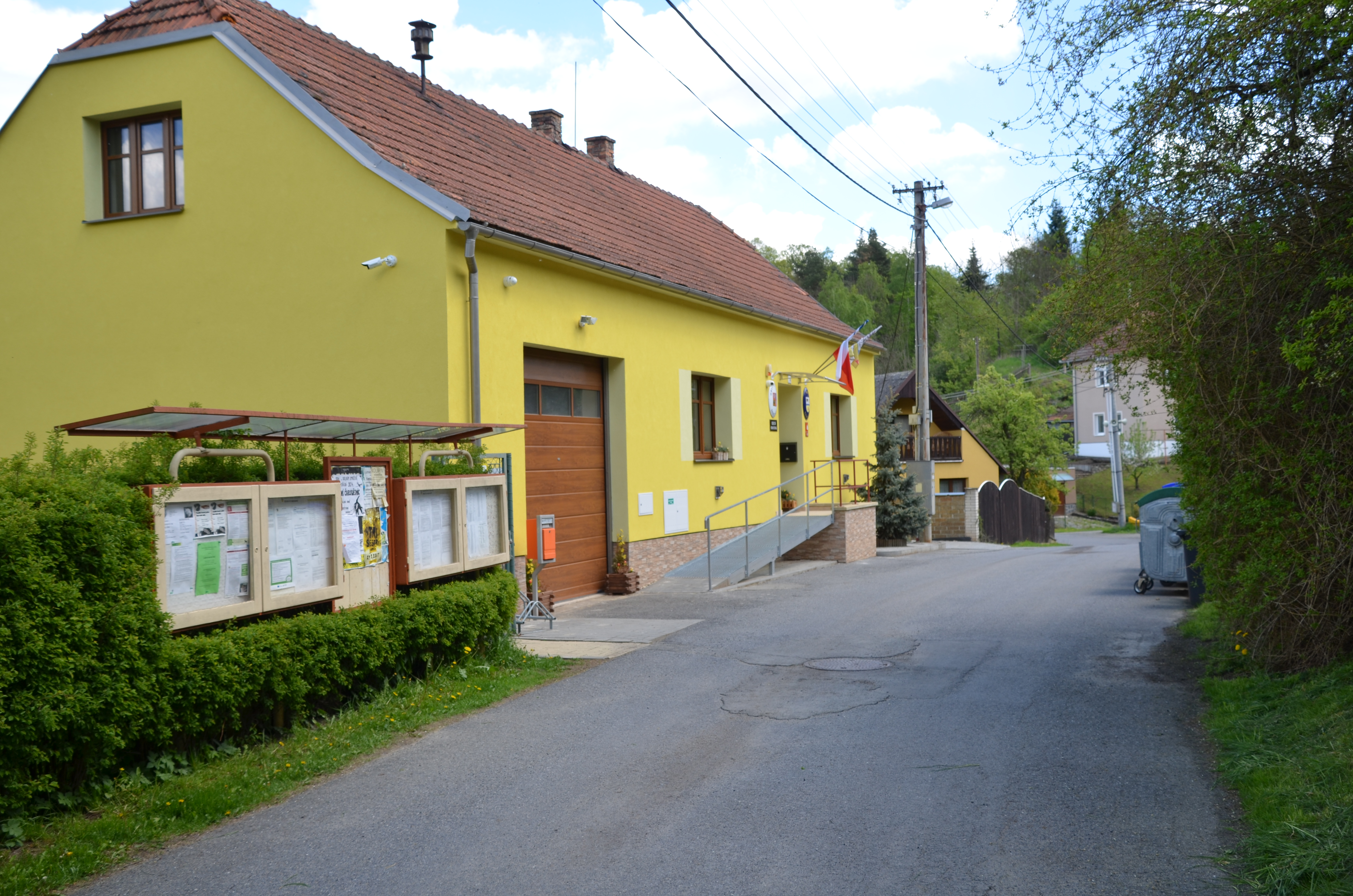 Obec Skrchov na Blanensku